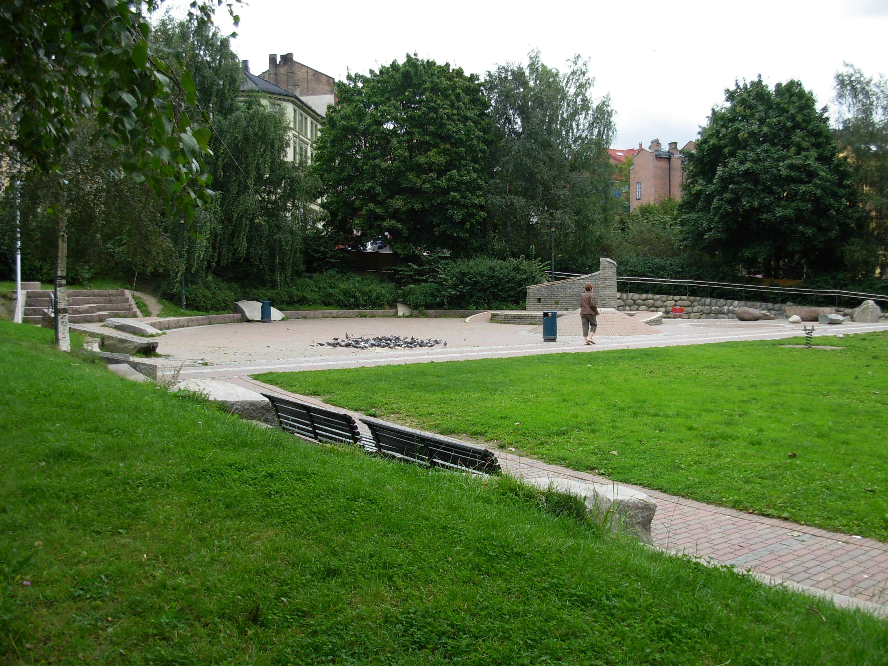 Sommerfrydhagen, Tøyen, Oslo